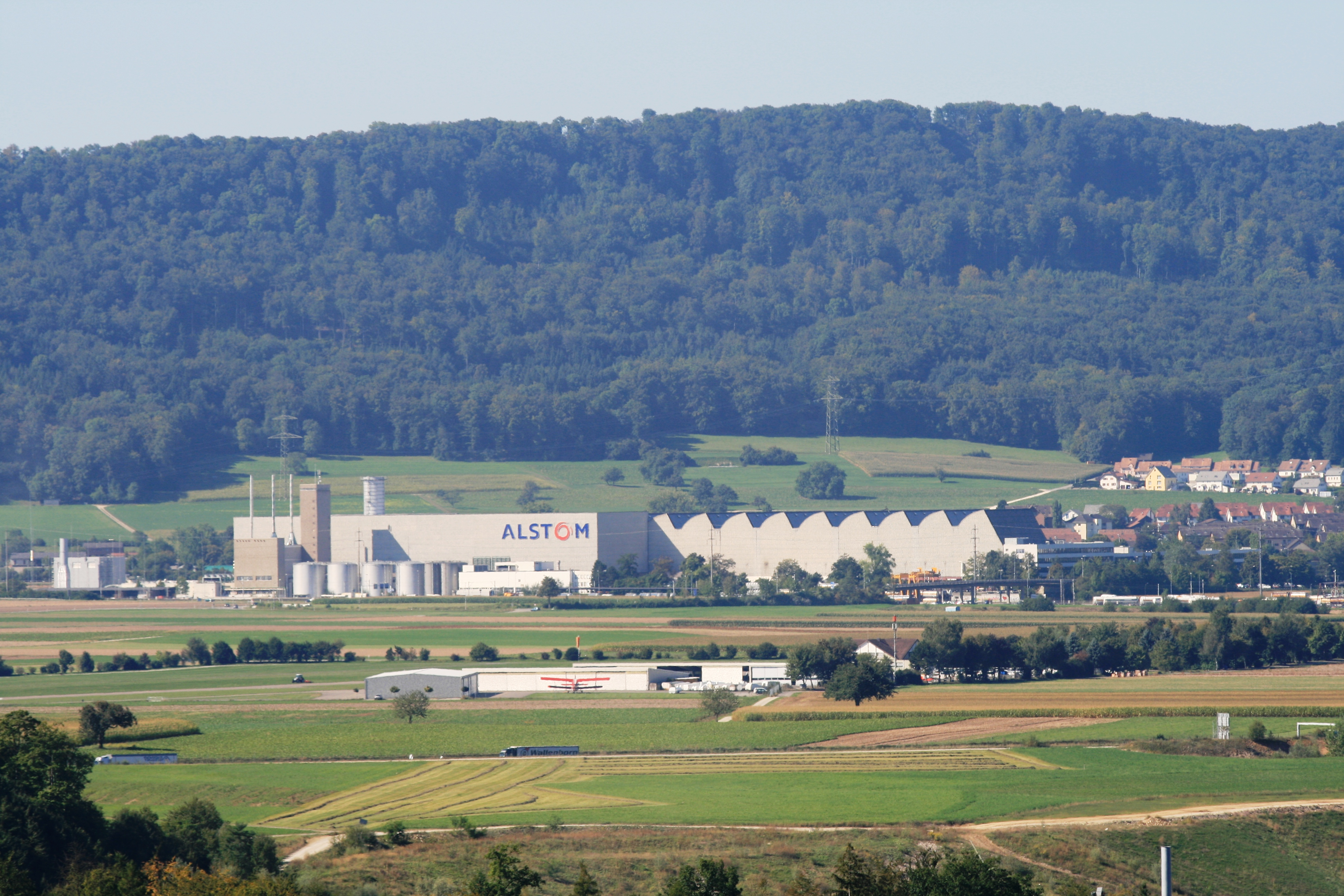 Fa. Alstom, Birr, Schweiz